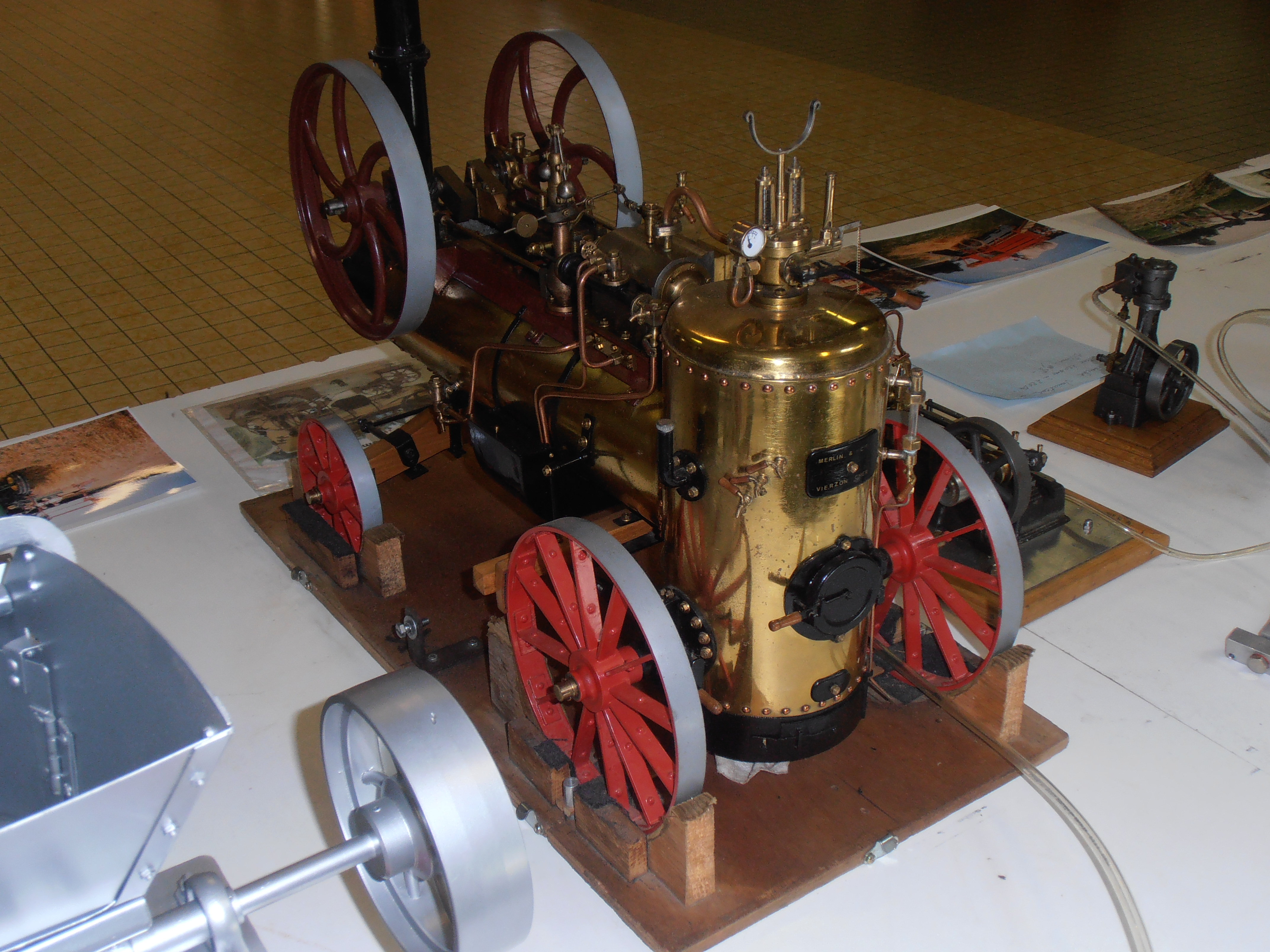 Orne, Saint-Martin d'Ecubleï, Fête du village et brocante du 7 juin 2015. Exposition de maquettes de matériel agricole dans la salle des fêtes par Roger Vervenken, collectionneur réalisateur